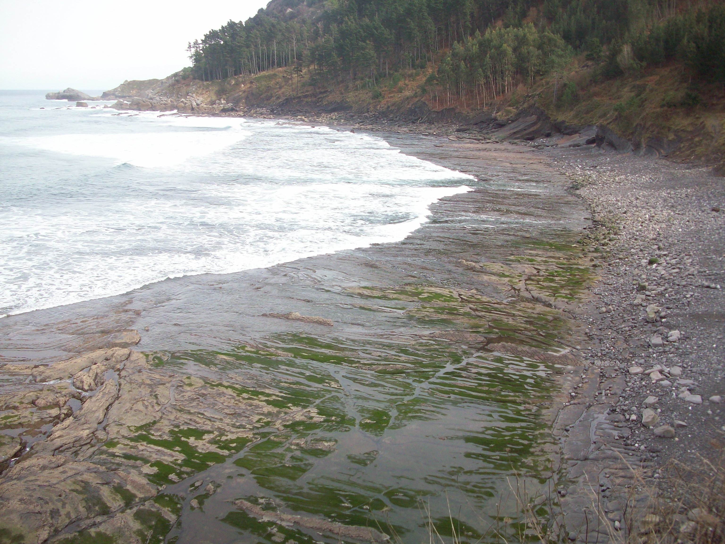 Ispaster udalerriko Ogella hondartza. Bizkaia, Euskal Herria. Ogella beach in Ispaster village. Biscay, Basque Country.